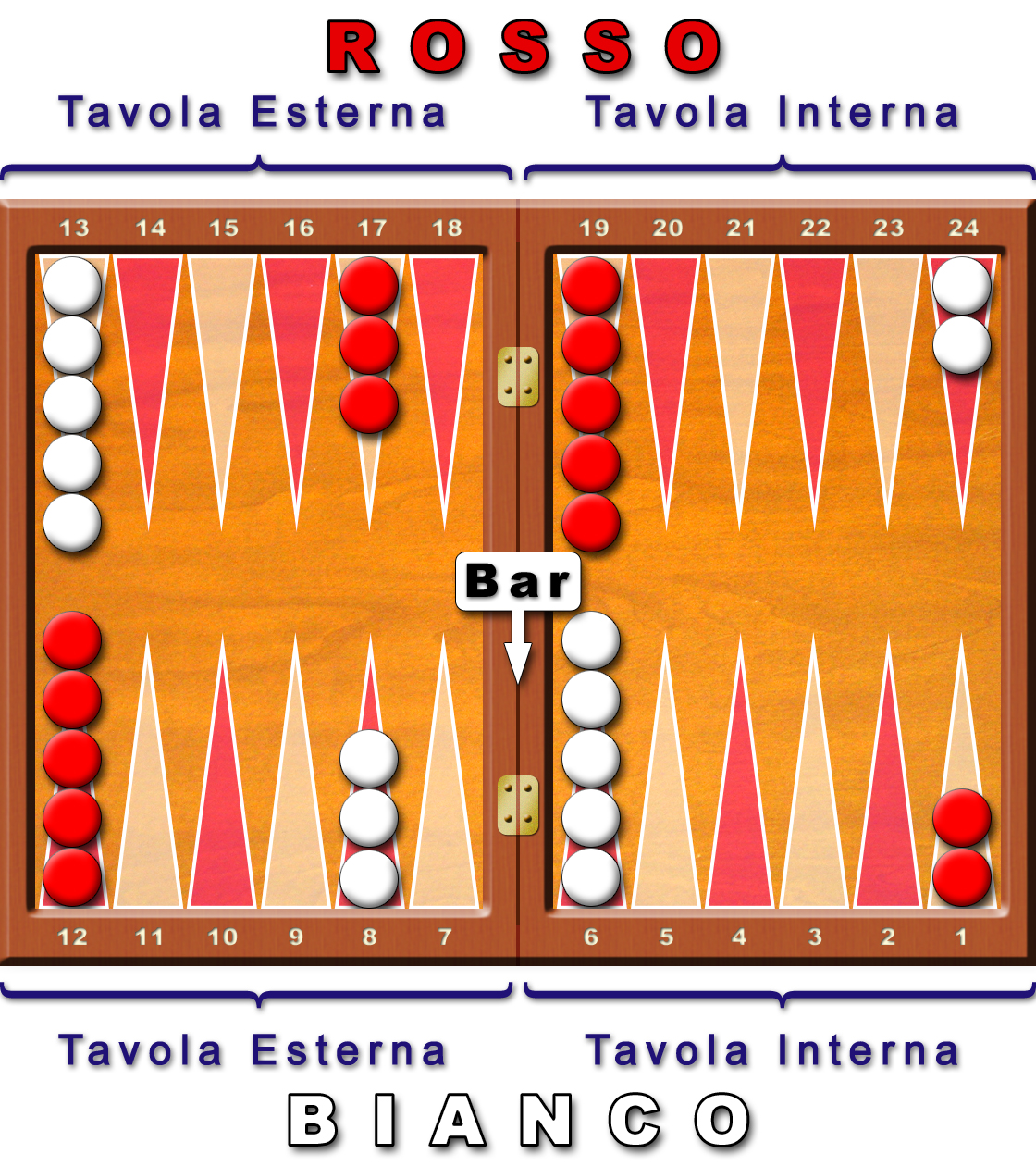 Backgammon--Tavola e pedine ad inizio gioco Francesco De Lorenzo (fr.dl CHIOCCIOLA tiscali.it) è l'autore di questa immagine e l'ha rilasciata sotto licenza GFDL